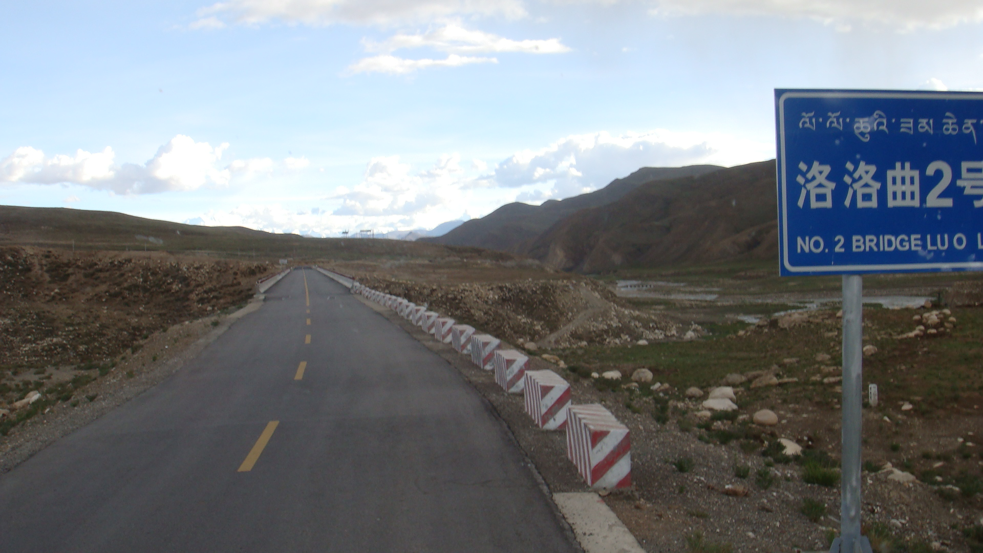 国道318 State Road 318 China Xinjiang Urumqi Welcome you to tour the, Китай Синьцзяна Урумчи приветствовать Вас на экскурсию, الصين ترحب زيارتك لاورومتشى فى شينجيانغ, 中国新疆のウルムチへの訪問を歓迎する, 中国新疆乌鲁木齐欢迎您来观光旅游